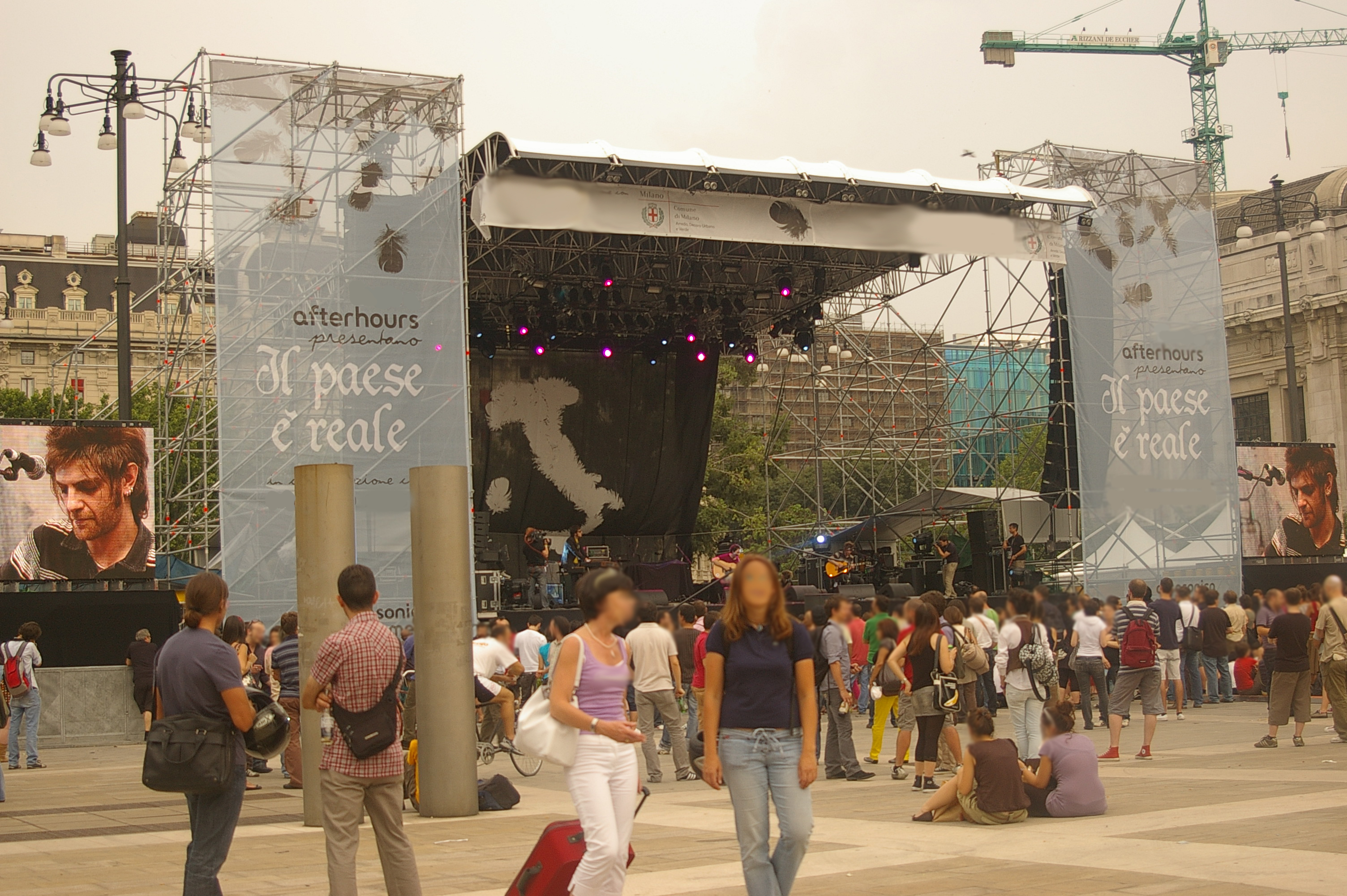 Il concerto: Il paese è reale, tenutosi a Milano il 19 giugno 2009, sul palco si esibiscono Amerigo Verardi e Marco Ancona